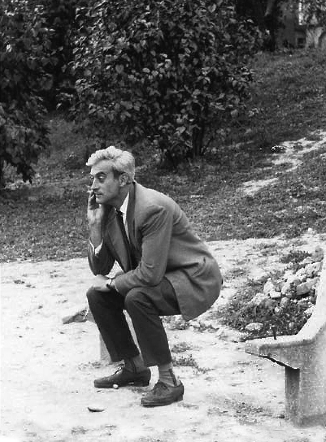 Béri Géza, költő, novellista, drámaíró, műfordító Vérmezőn készült fényképe